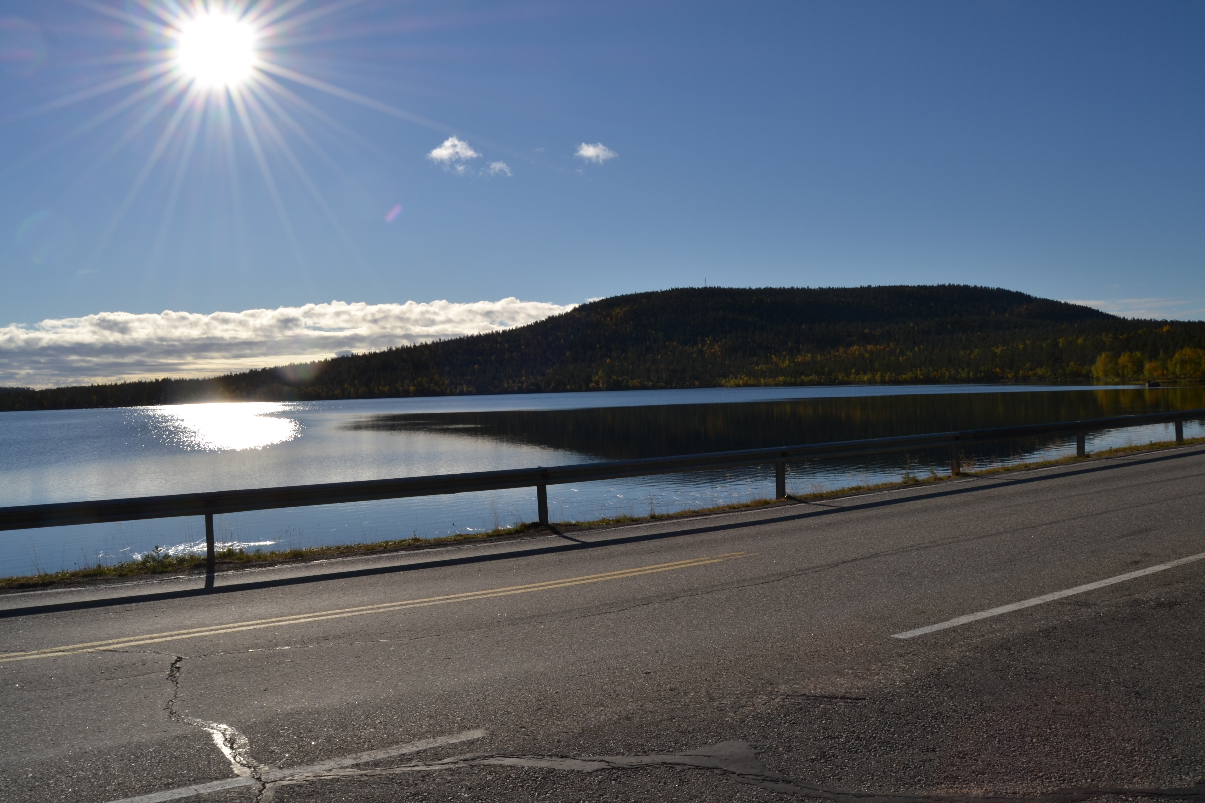 Sovintovaara VT4 suunnasta